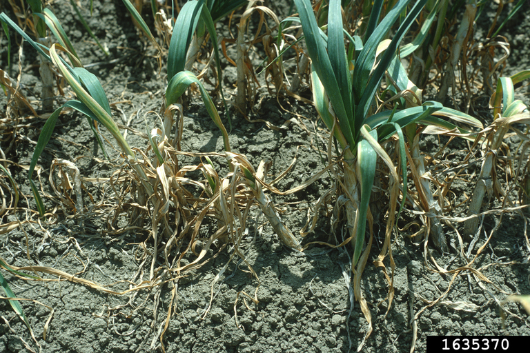 Ditylenchus dipsaci at Allium sativum